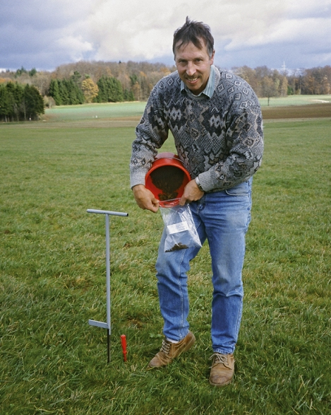 Entnahme von Bodenproben mit einem Bohrstock auf Grünland